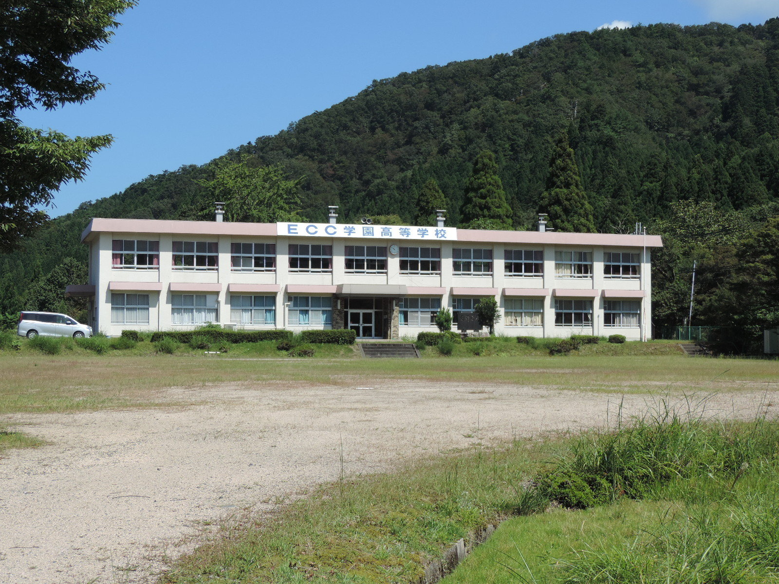 ECC学園高等学校（滋賀県高島市）。2017年撮影